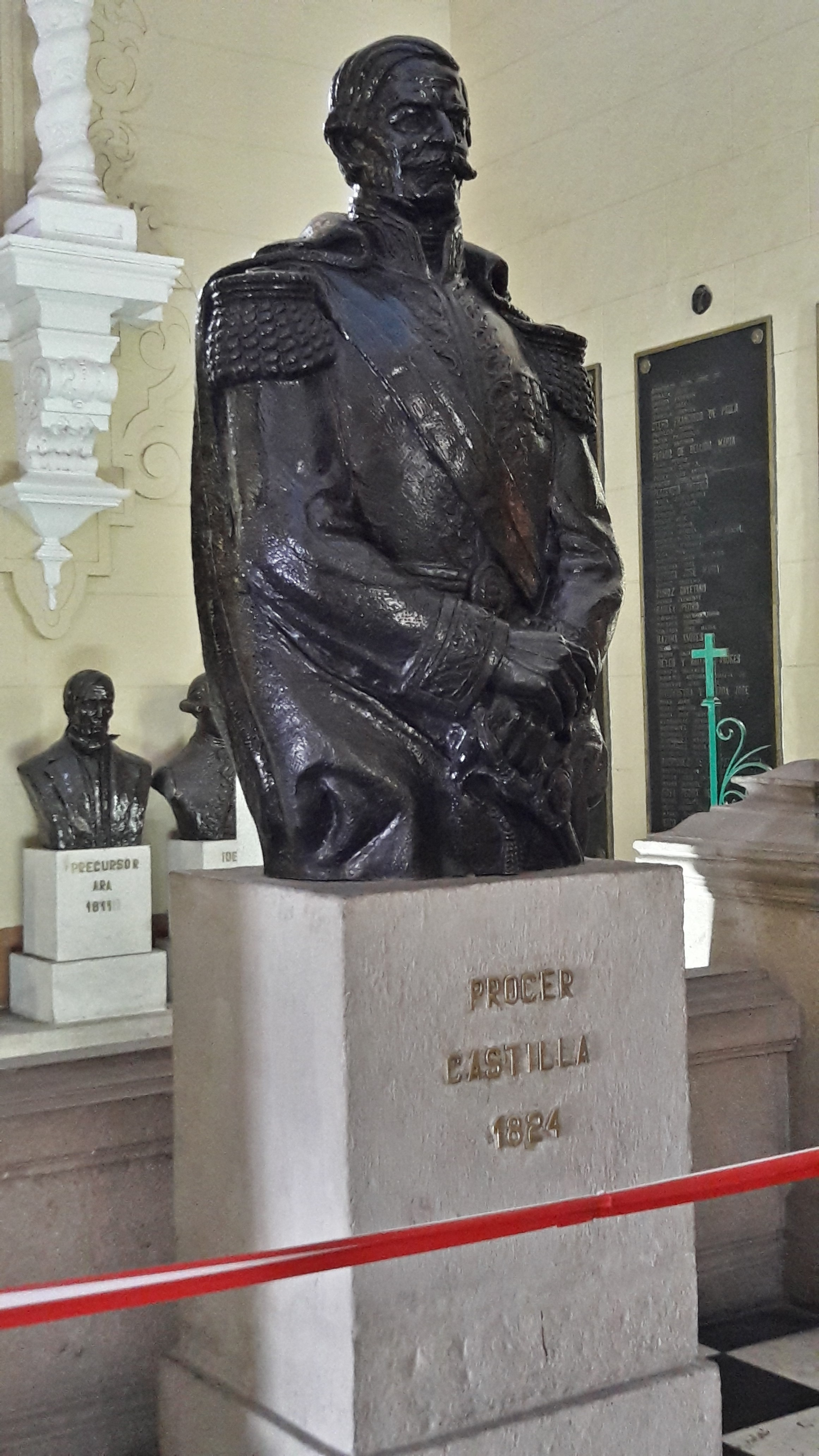 Prócer Castilla 1824